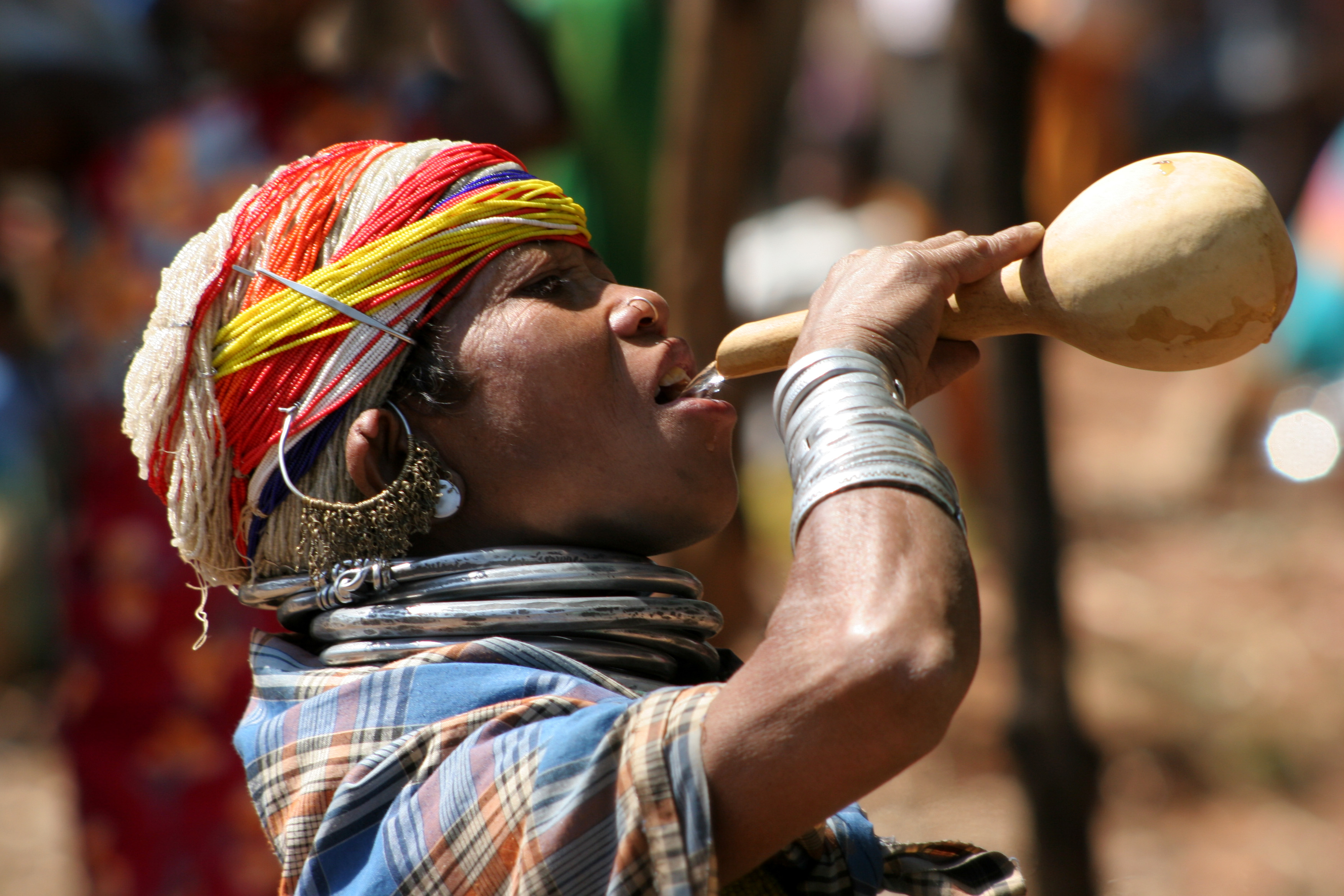 Inde Chatisgaht, femme Bondo buvant un alcool de riz en fin de marché